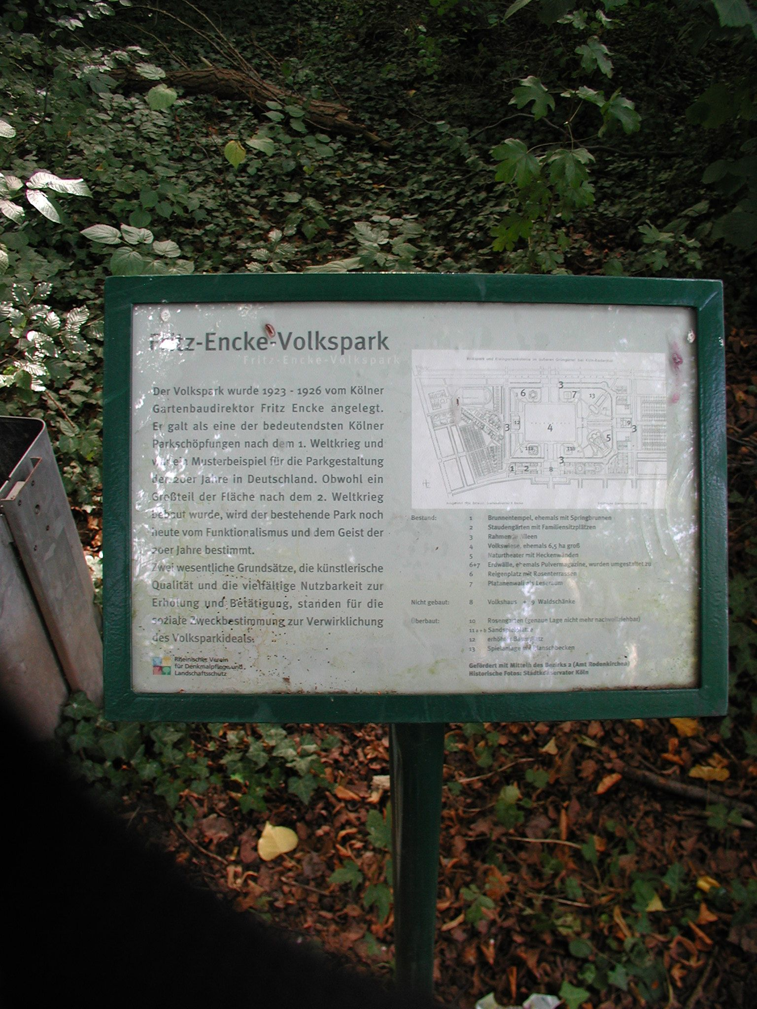 Koeln-Fritz-Enke-Volkspark